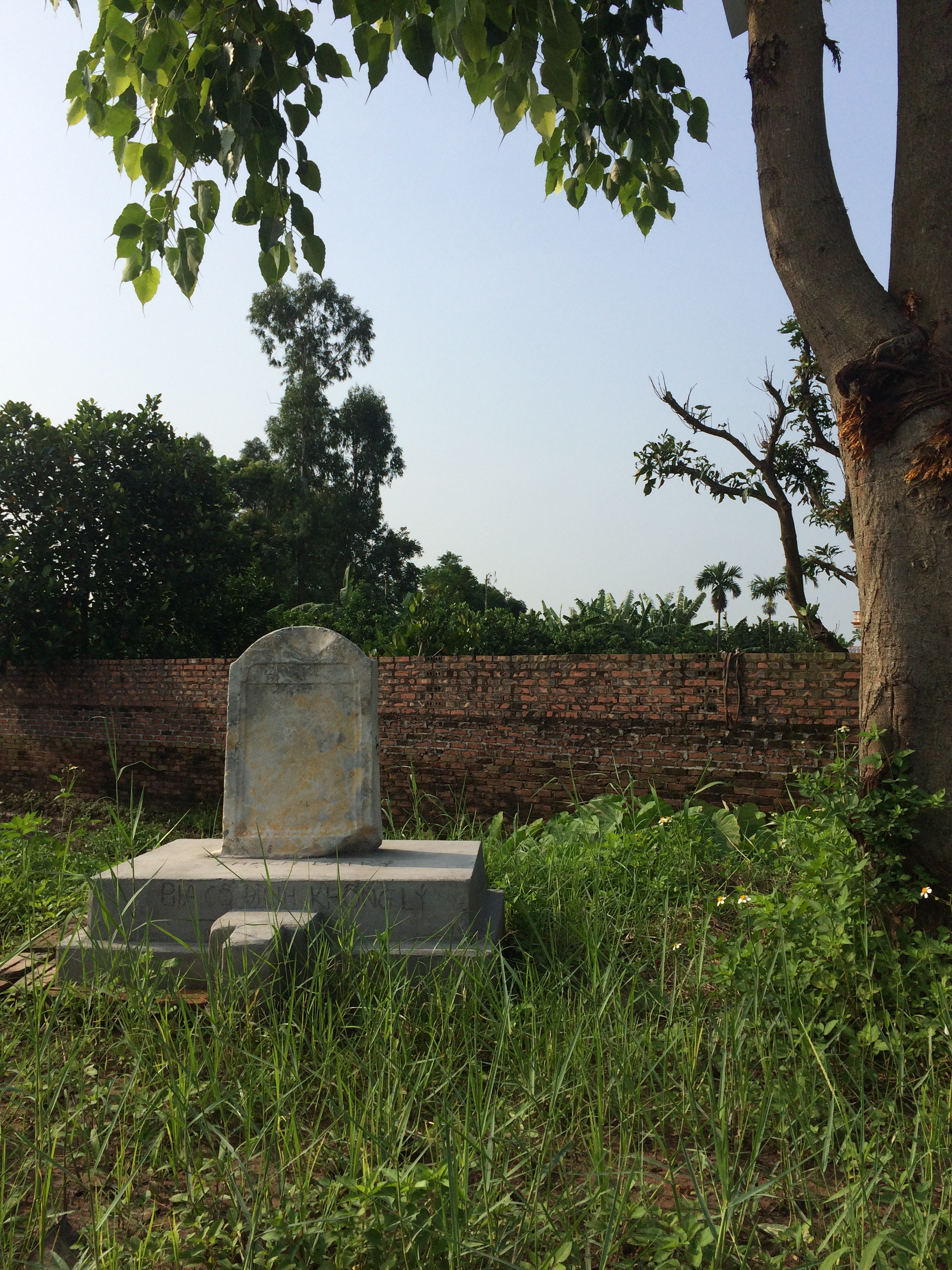 bia gần cổng Khổng Lý